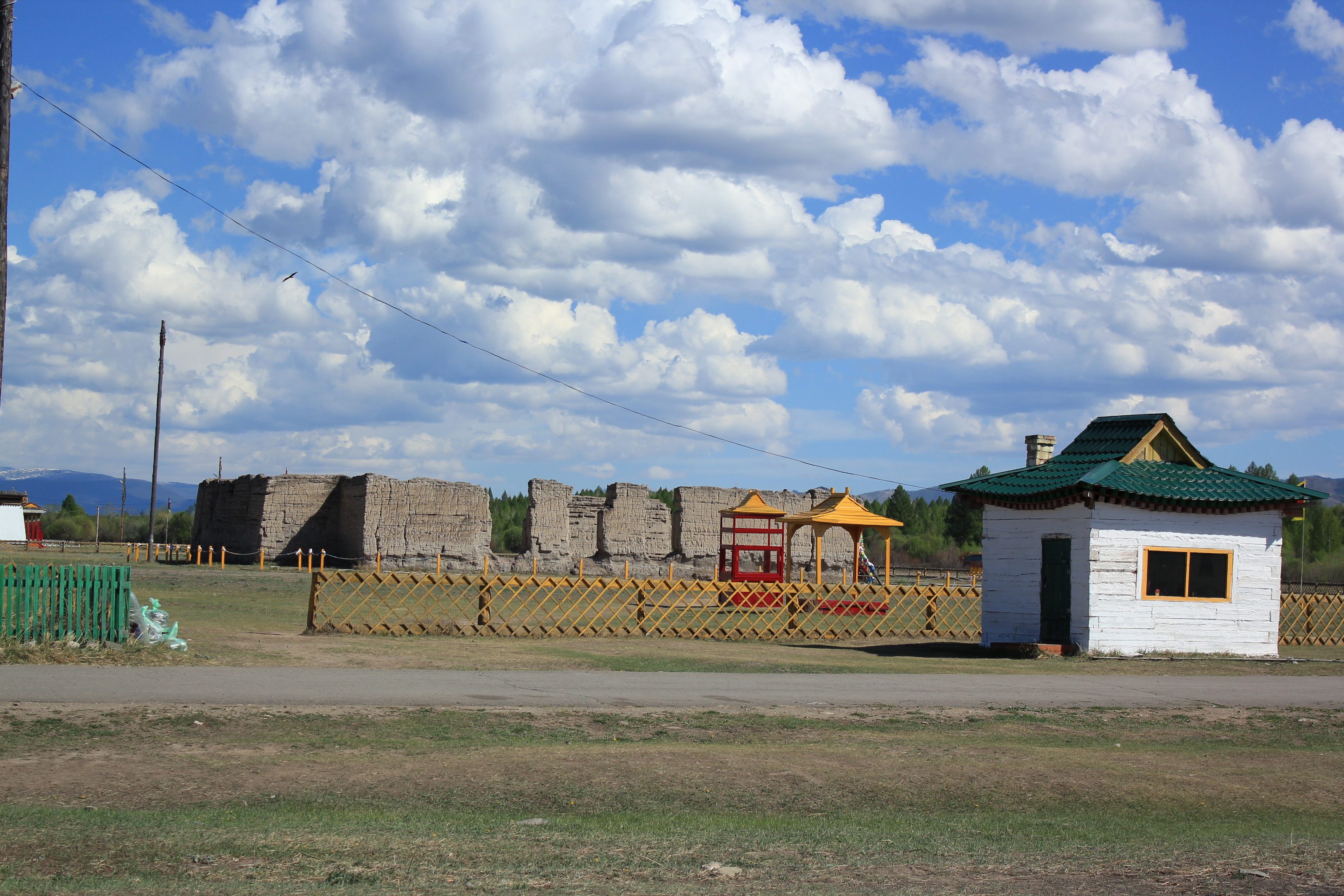 Разрушенный храм "Устуу-Хурээ"